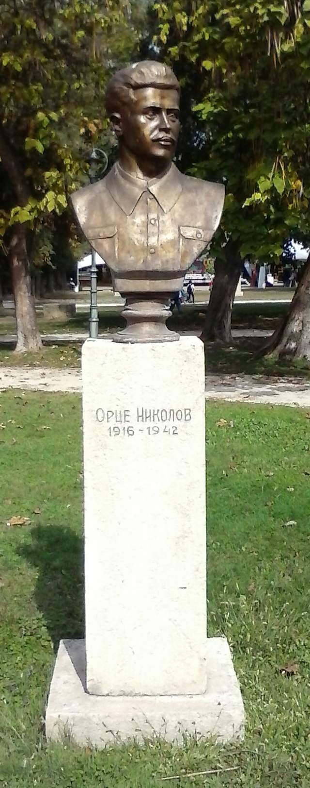 Биста на Орце Николов во Градскиот парк во Скопје